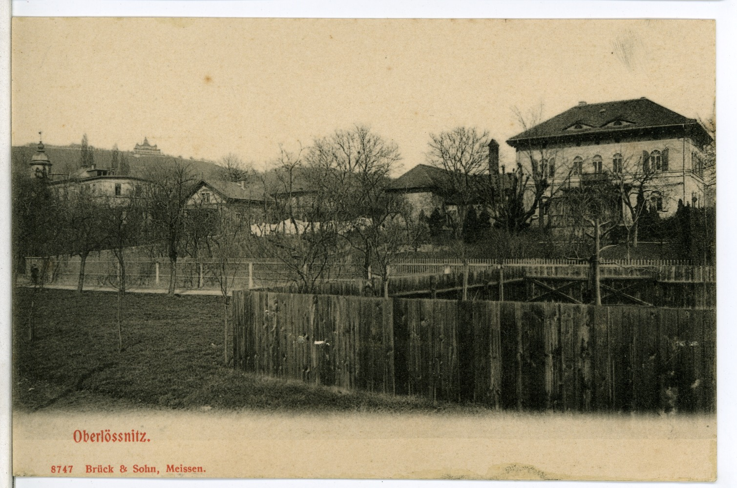 Radebeul; Oberlößnitz This postcard is from publisher Brück & Sohn in Meißen ( postcard has a unique number 08747 and is available in a higher resolution at the publisher. This images was uploaded in a cooperation project between Wikipedians and the publisher.